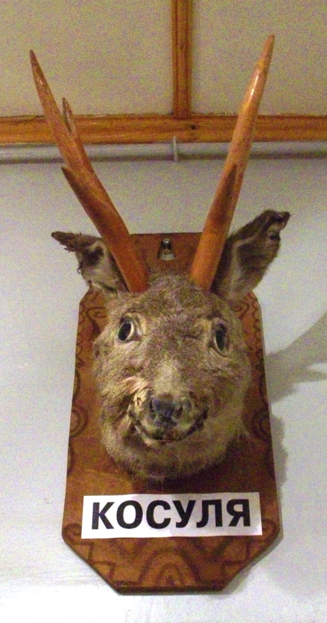 Косуля